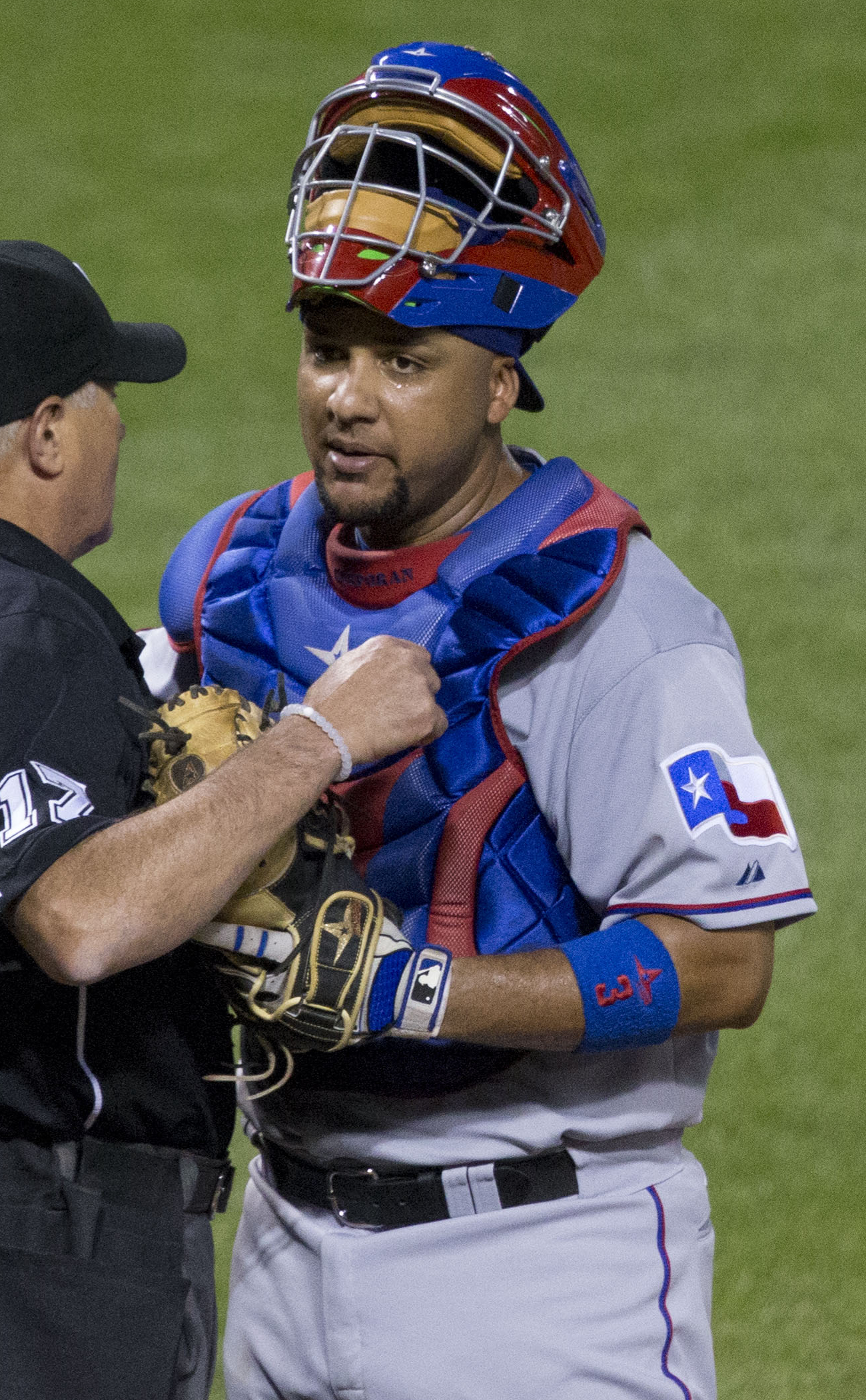 Carlos Corporán